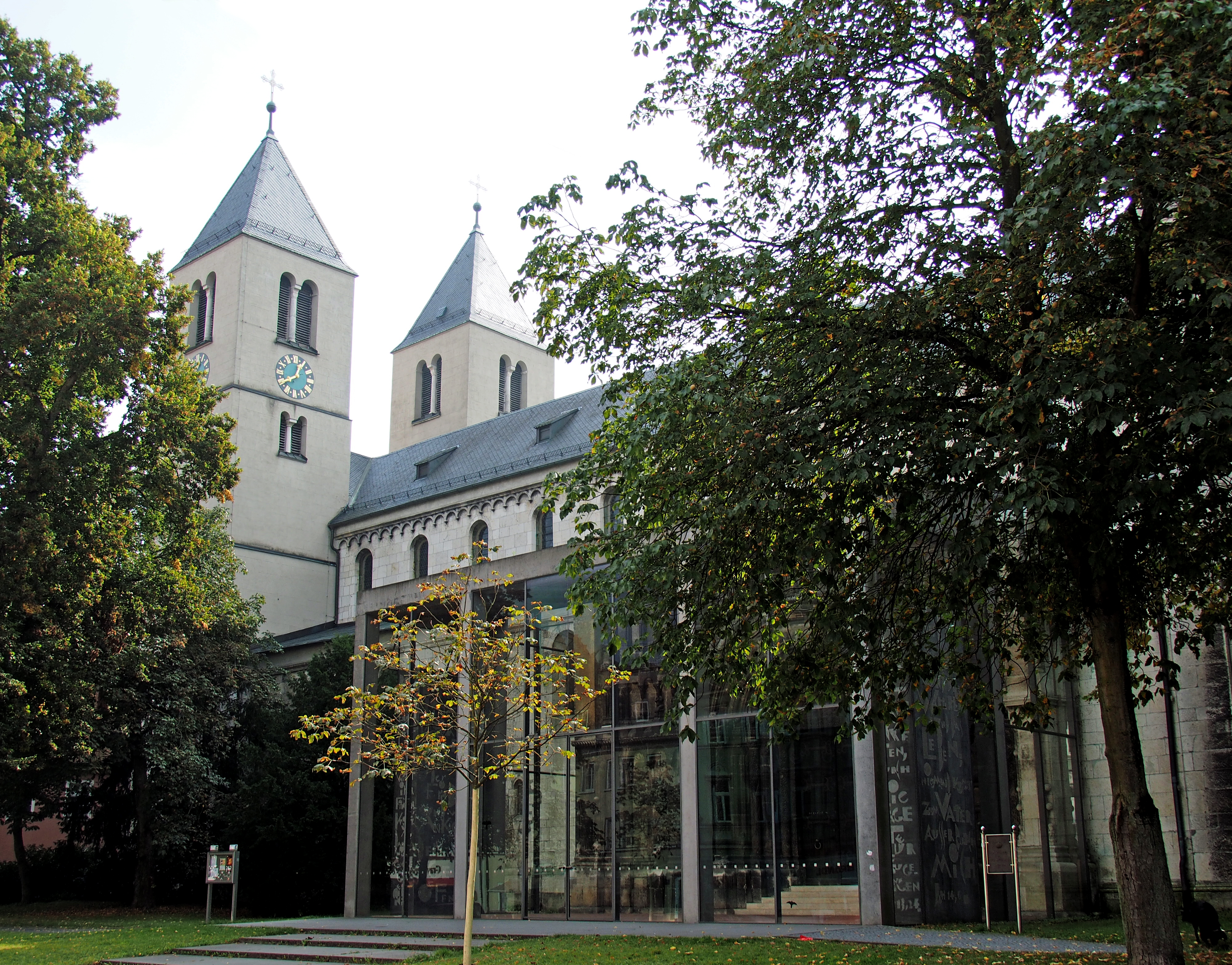 Schottenkirche St. Jakob in Regensburg (Bayern, Oberpfalz)